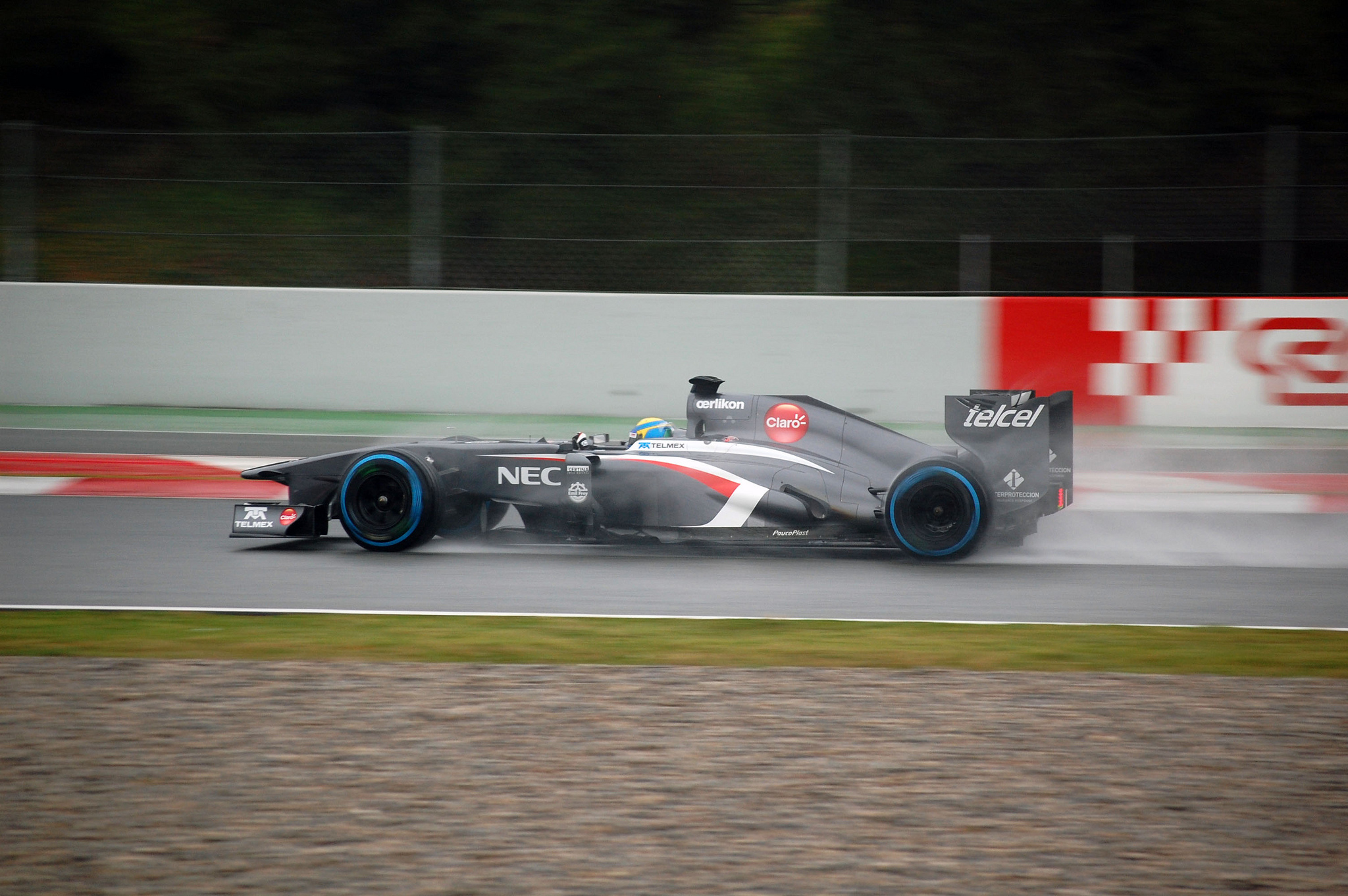 F1 test days 28/02/2013